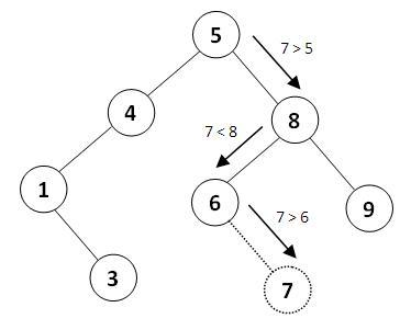 درج عنصر